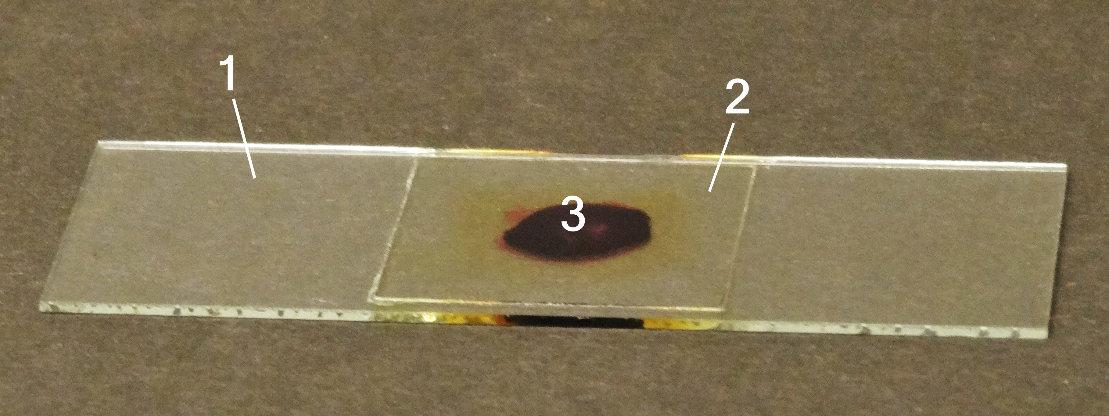 Schnittpräparat für die Lichtmikroskopie. 1 Glasobjektträger (76 x 26 mm), 2 Deckglas, dazwischen 3 gefärbter Organschnitt